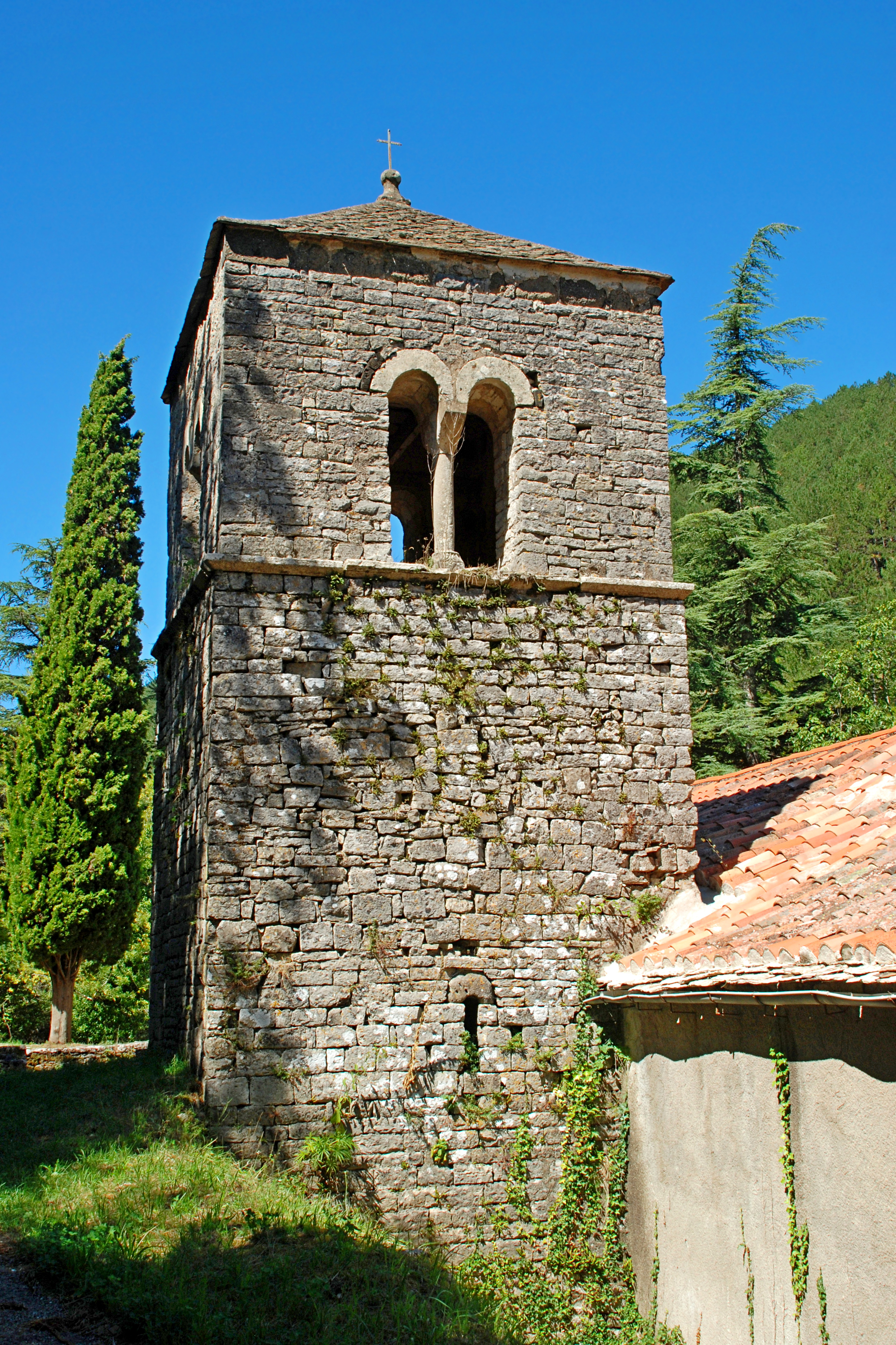 France - Languedoc - Hérault - Lunas - Chapelle Notre-Dame-de-Nize .